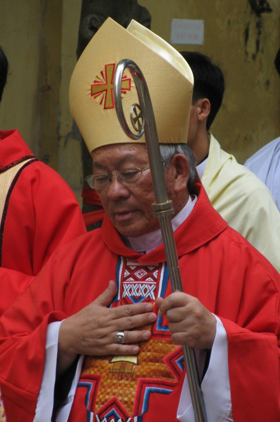 Tổng giám mục Hà Nội Nguyễn Văn Nhơn